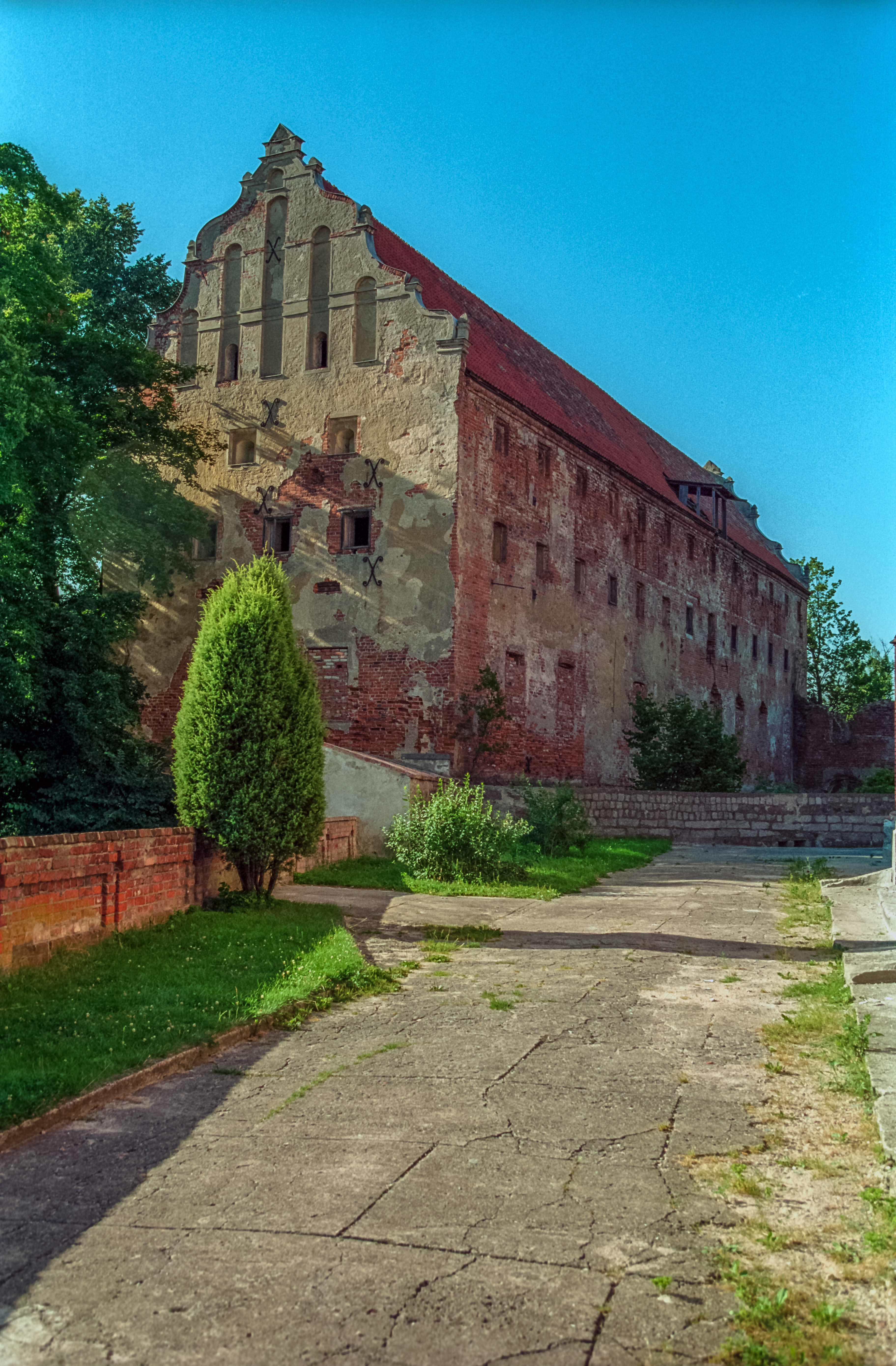 Pieniężno, pozostałości zamku